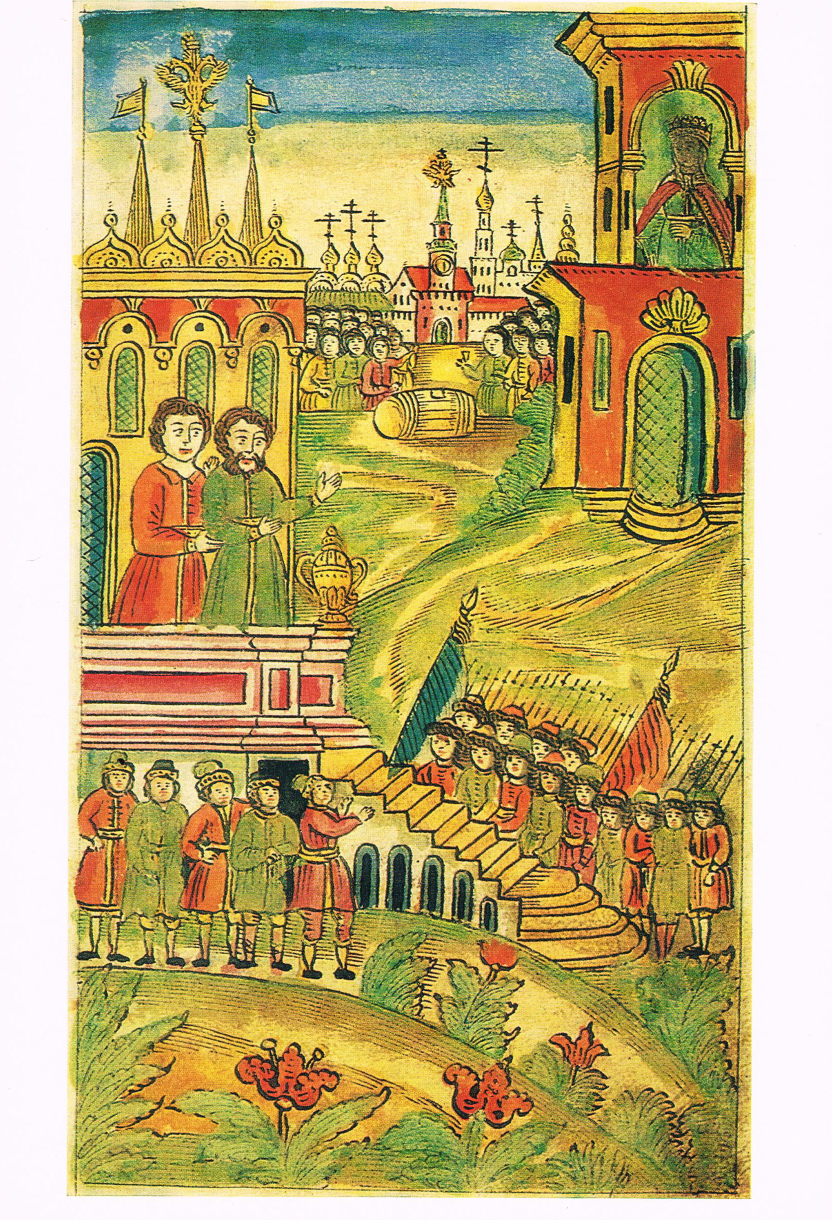 Восставшие стрельцы. Действие происходит в кремле - слева князь М. Долгорукий и боярин А.Матвеев убеждают стрельцов, ворвавшихся в Кремль, разойтись. Справа в тереме видна царевна Софья Миниатюра из рукописи 1-й пол. 18 века "История Петра I", соч. П. Крекшина. Собрание А. Барятинского. ГИМ.